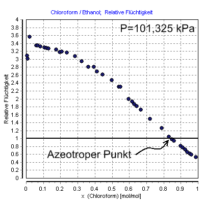 Diagramm zeigt die relativen Flüchtigkeiten im Chloroform/Ethanol- Gemisch